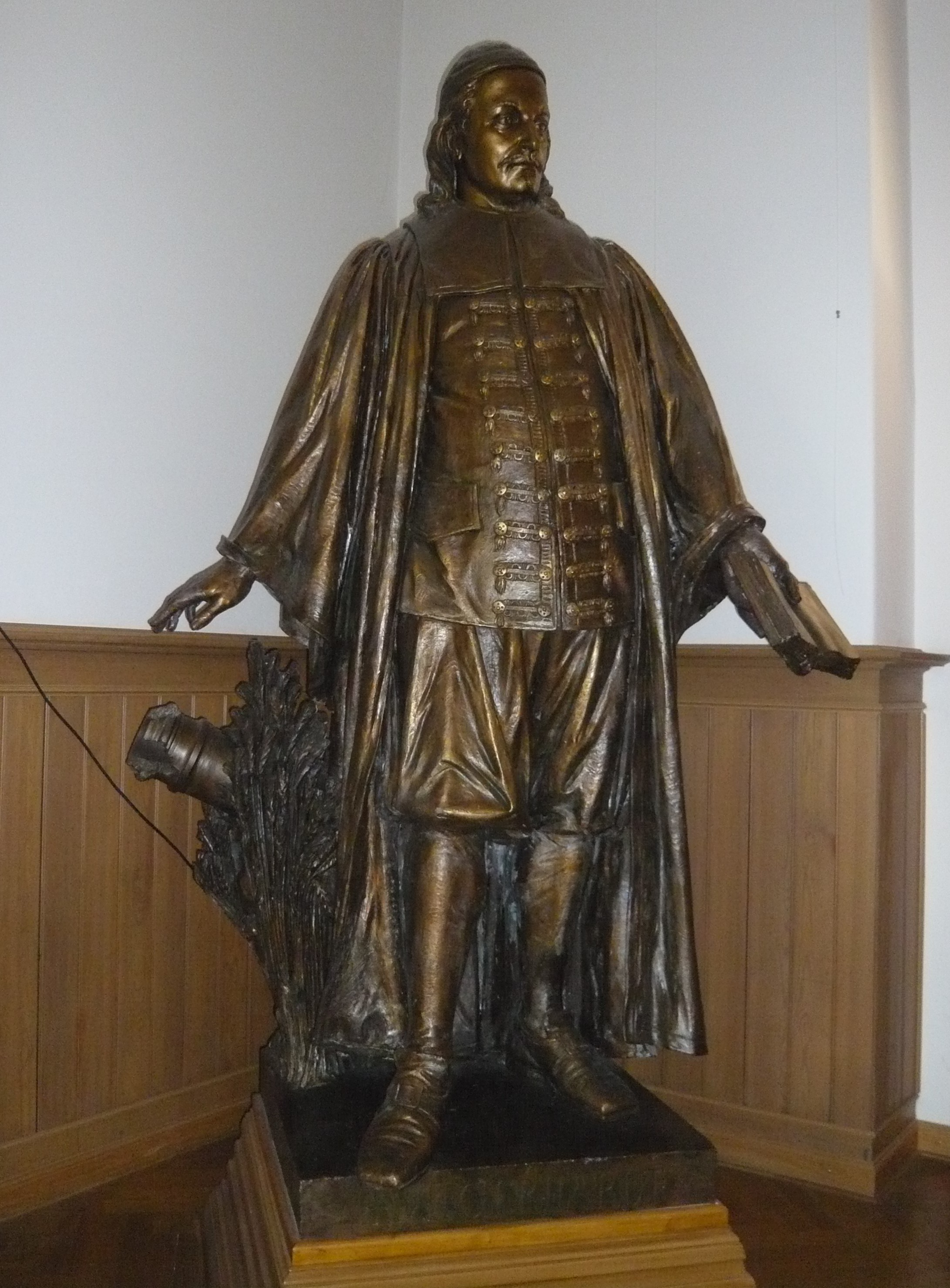 Paul-Gerhardt-Stift Berlin